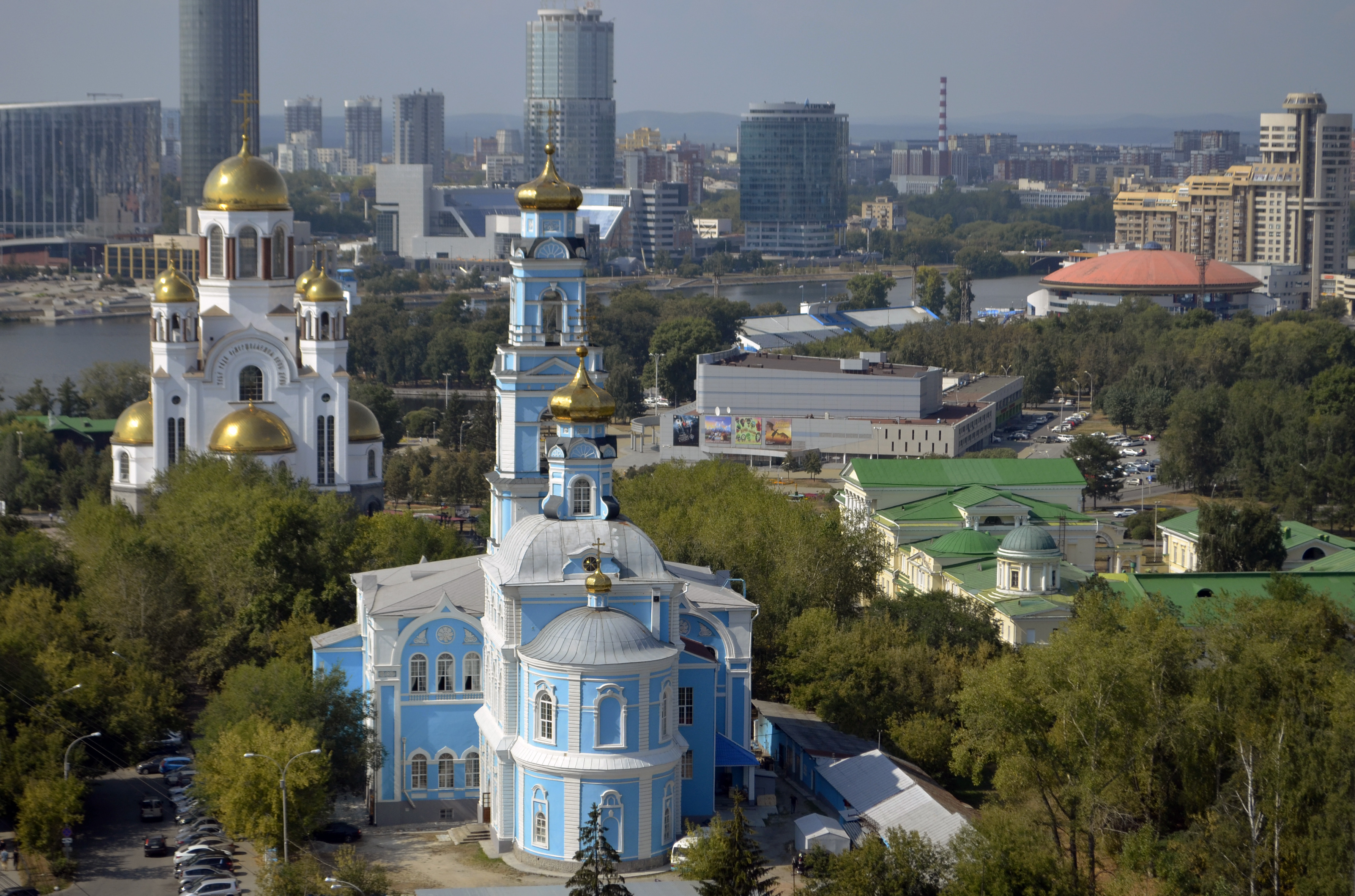 Церковь Вознесения Христова (Вознесенская): площадь Комсомольская / улица Клары Цеткин, 11, Екатеринбург, Свердловская область